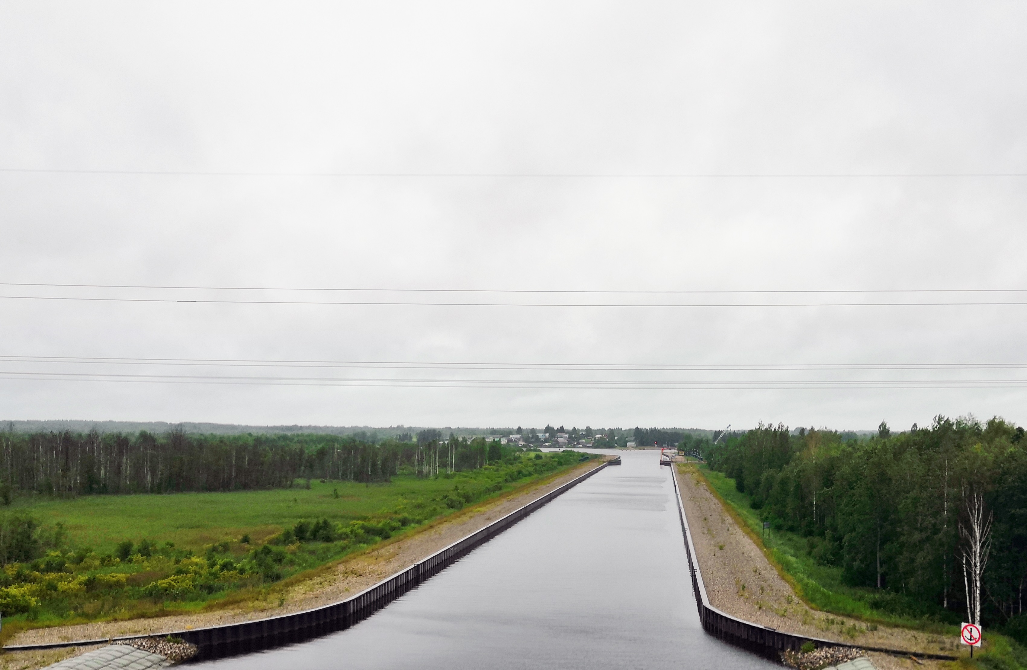 Кишемский канал, вид на юго-запад